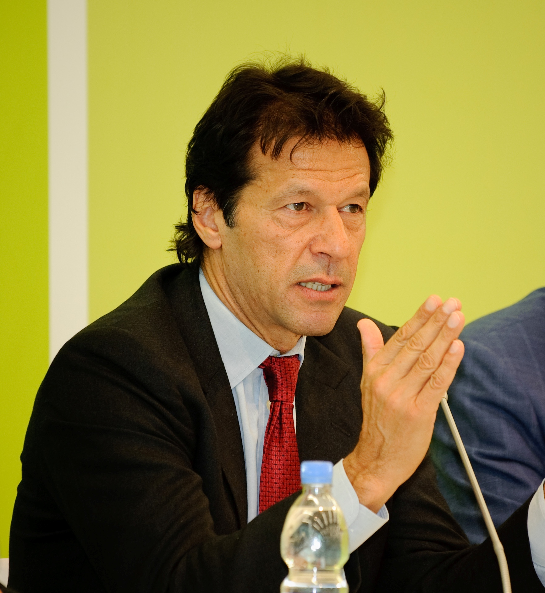 Pakistan ist ein Kriegsgebiet. Es hat neben einer Vielzahl anderer Probleme, die dringend die Etablierung von Rechtsstaatlichkeit und demokratischen Strukturen erfordern, mit großen Bedrohungen von Militanten, Aufständischen und Terroristen zu kämpfen. Im Lichte der derzeitigen Krise diskutierten hochrangige Gäste aus Pakistan und mehrere deutsche Experten über Strukturen und Defizite der Rechtsstaatlichkeit wie auch die derzeitige Sachlage, parallele Rechtssysteme, die Beziehungen zwischen Politik und Judikative und die Rolle politischer Parteien und der Gesellschaft. Die Heinrich-Böll-Stiftung veranstaltete am 26. Oktober 2009 eine Konferenz und Fachdiskussion unter dem Titel "Rule of Law: The Case of Pakistan". Eine Dokumentation finden Sie auf Foto: Stephan Röhl